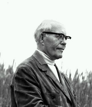 Gustav Könnecke (1908–1992), deutscher Acker- und Pflanzenbauwissenschaftler (auf dem Versuchsfeld in Bärenrode im Harz, bei Gütersberge)